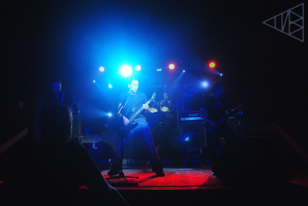 концерт Стиз